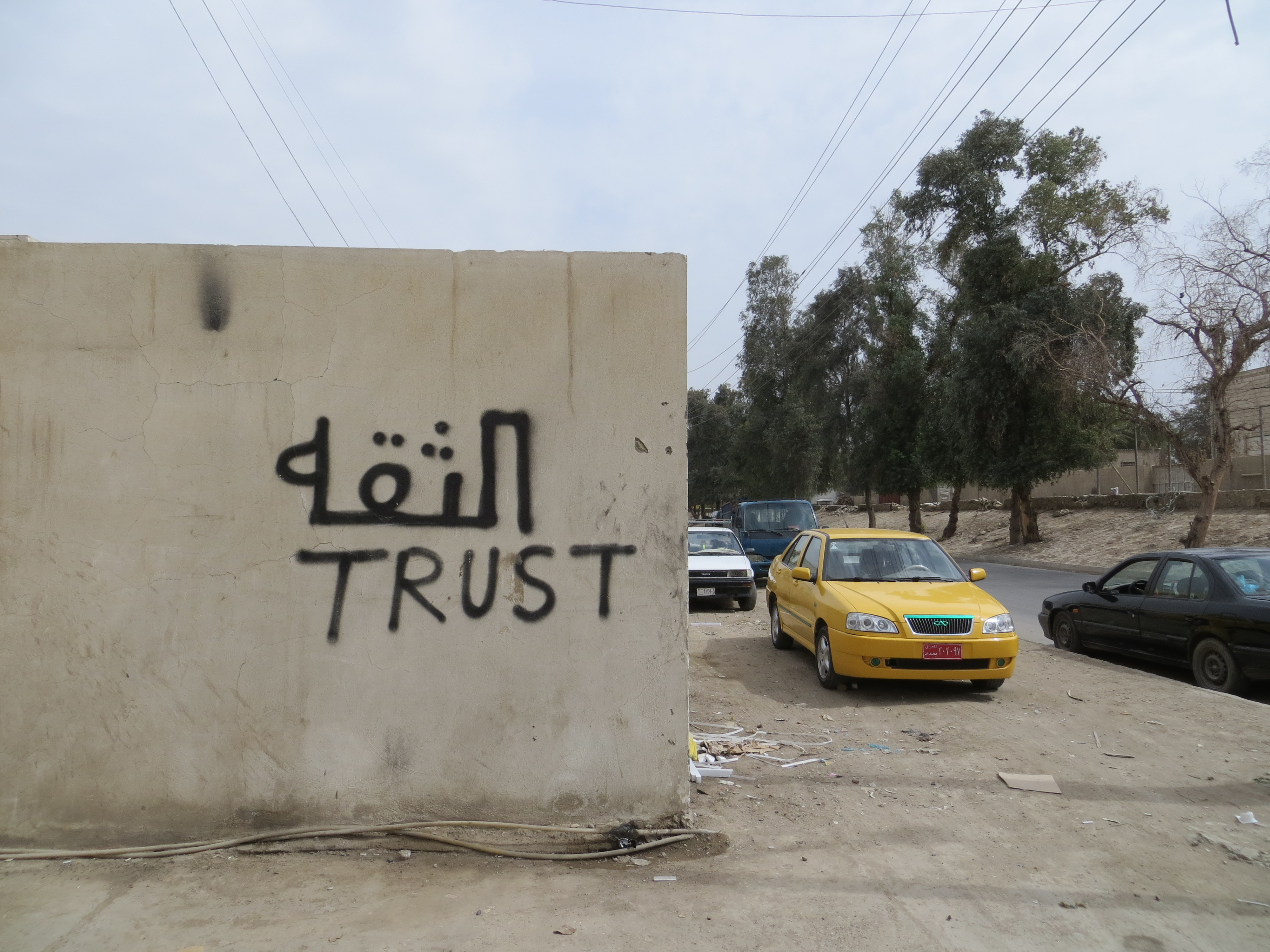 Baghdad, 2013